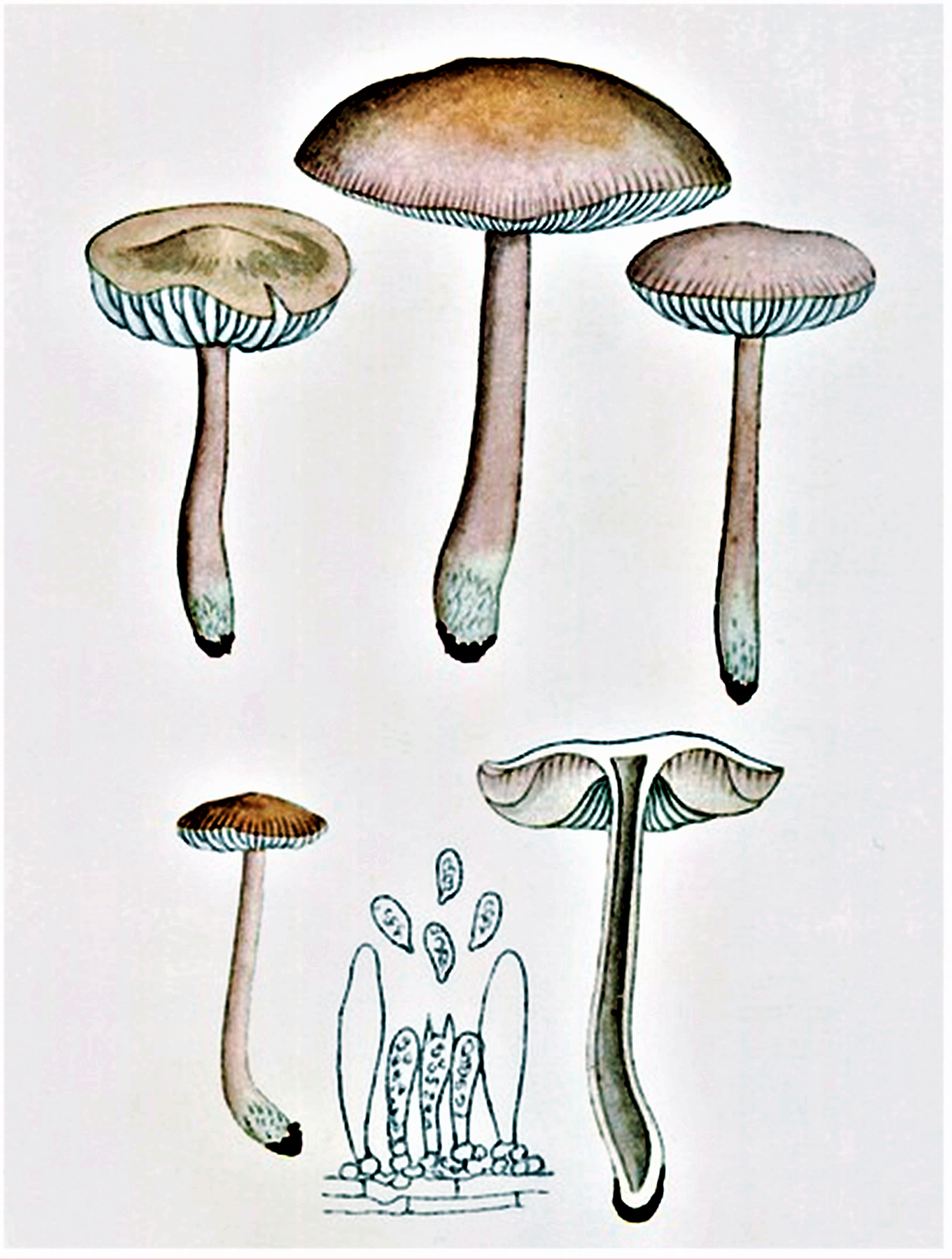 Giacomo Bresadola: Mycena pura (Pers., 1794) P.Kumm. (1871)